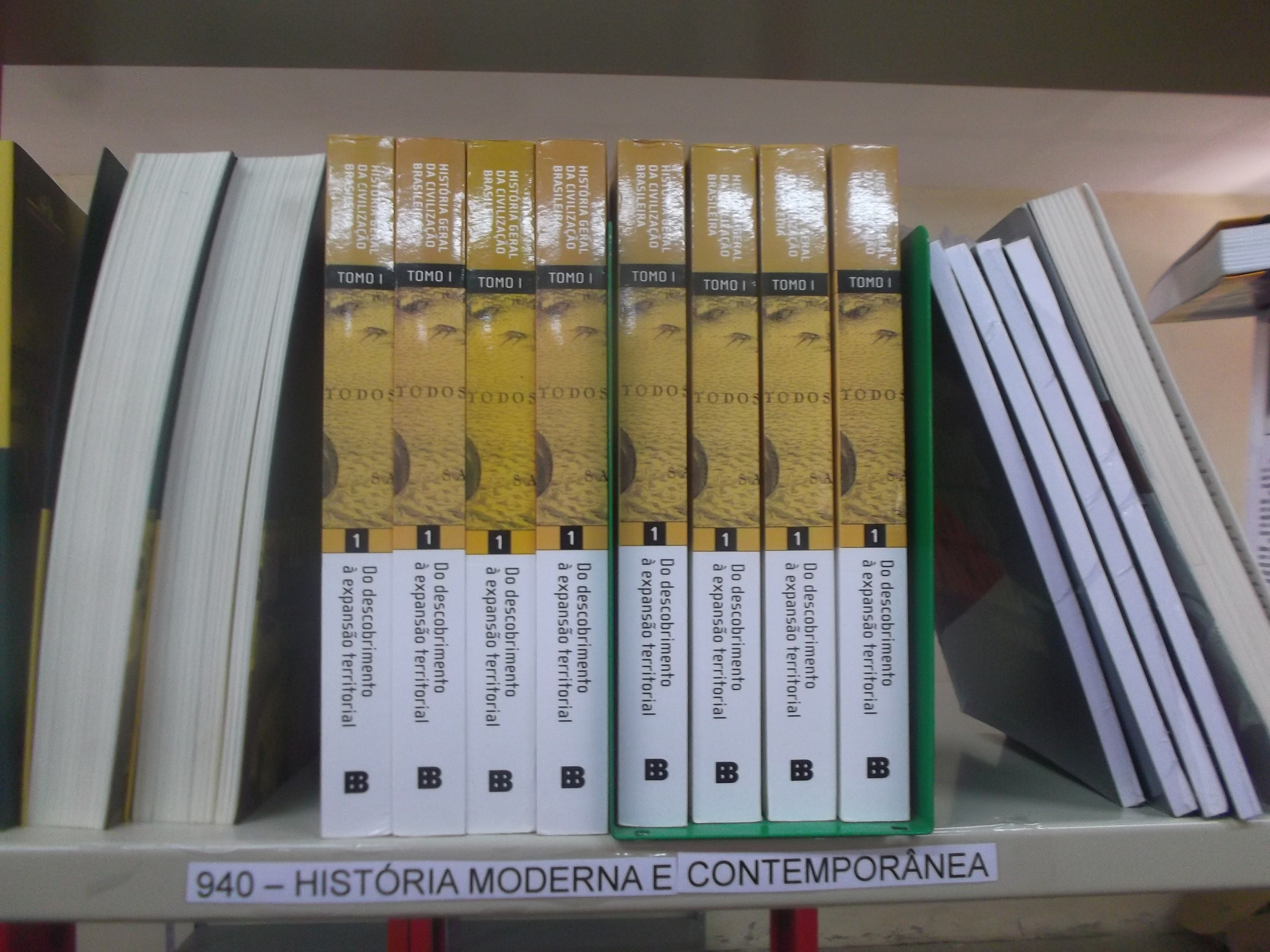 Voumes da coleção História Geral da Civilização Brasileira numa biblioteca universitária da Universidade Estadual do Piauí.